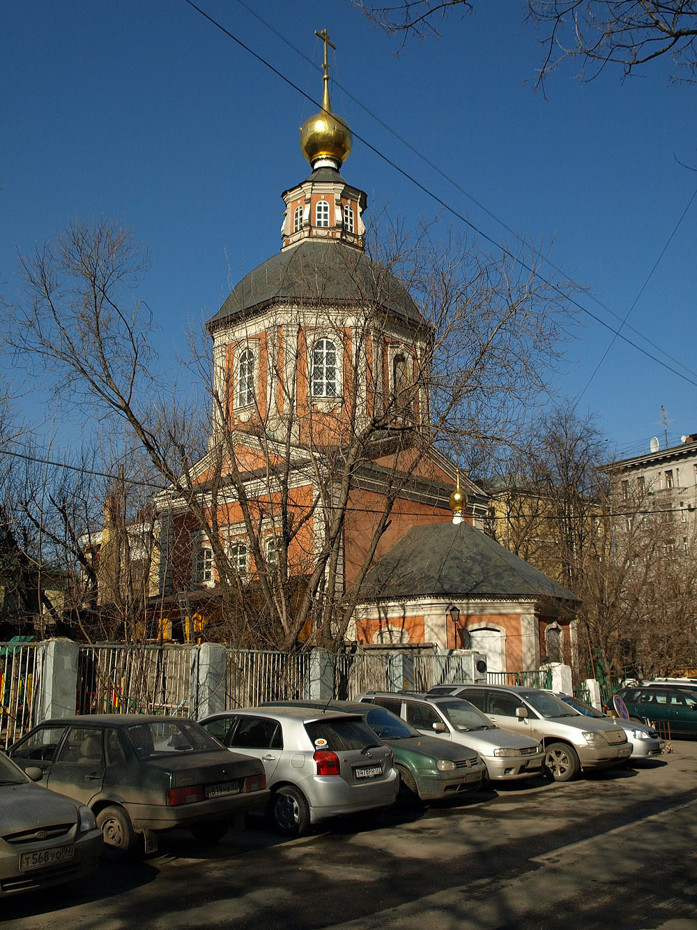 Church of Saviour in Bolvanovka (Спас на Болвановке)